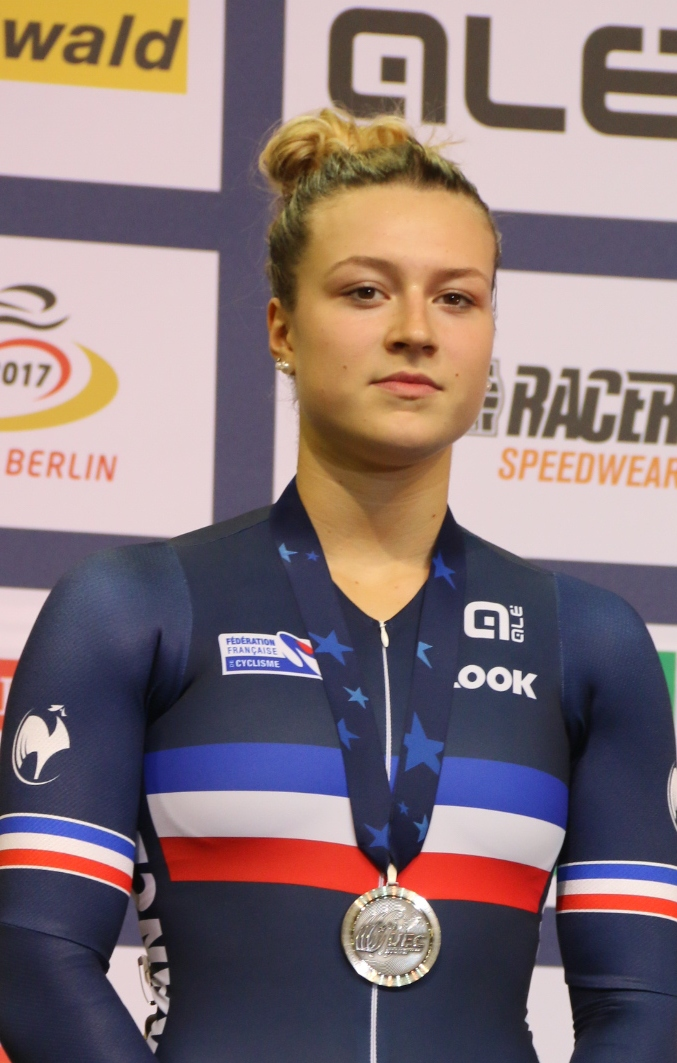 Mathilde Gros, französische Radsportlerin - Silber im Sprint